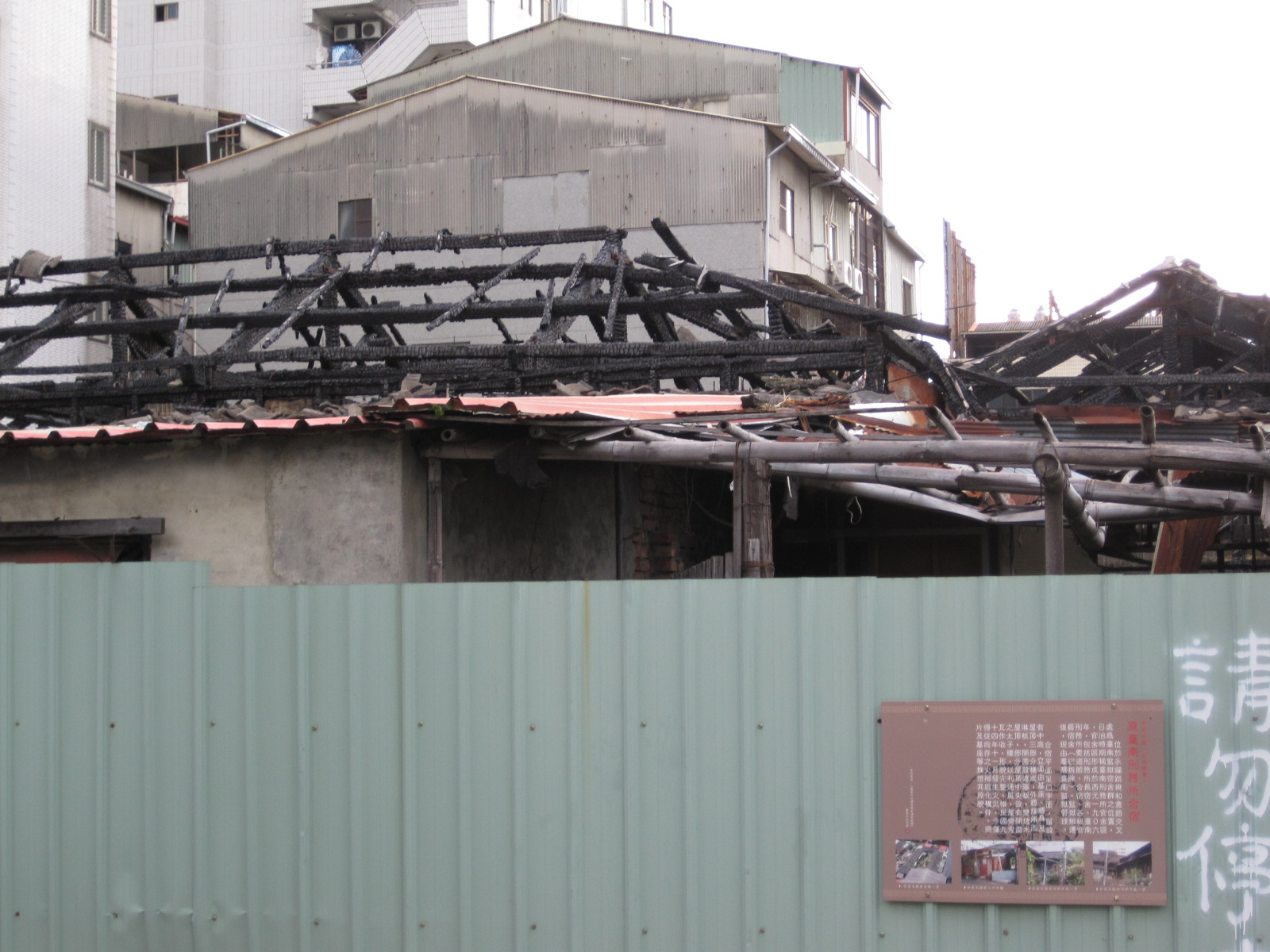 原台南刑務所合宿，因失火僅餘碳化木構。